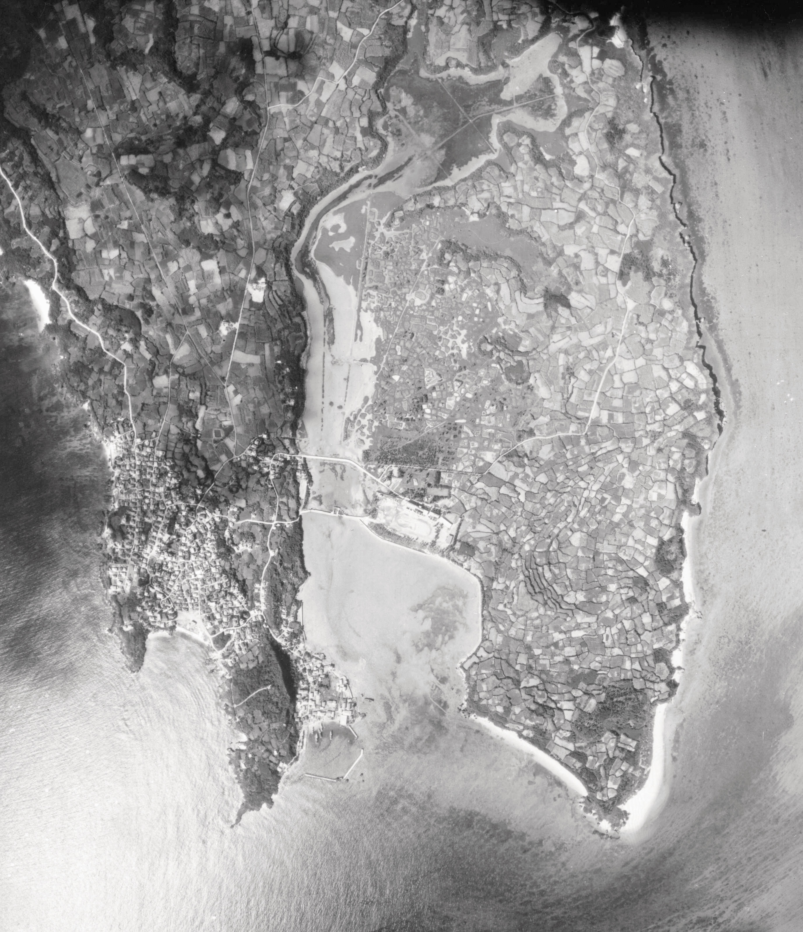 池間島（池間湿原、池間漁港）の空中写真。米軍が1963年1月3日に撮影。